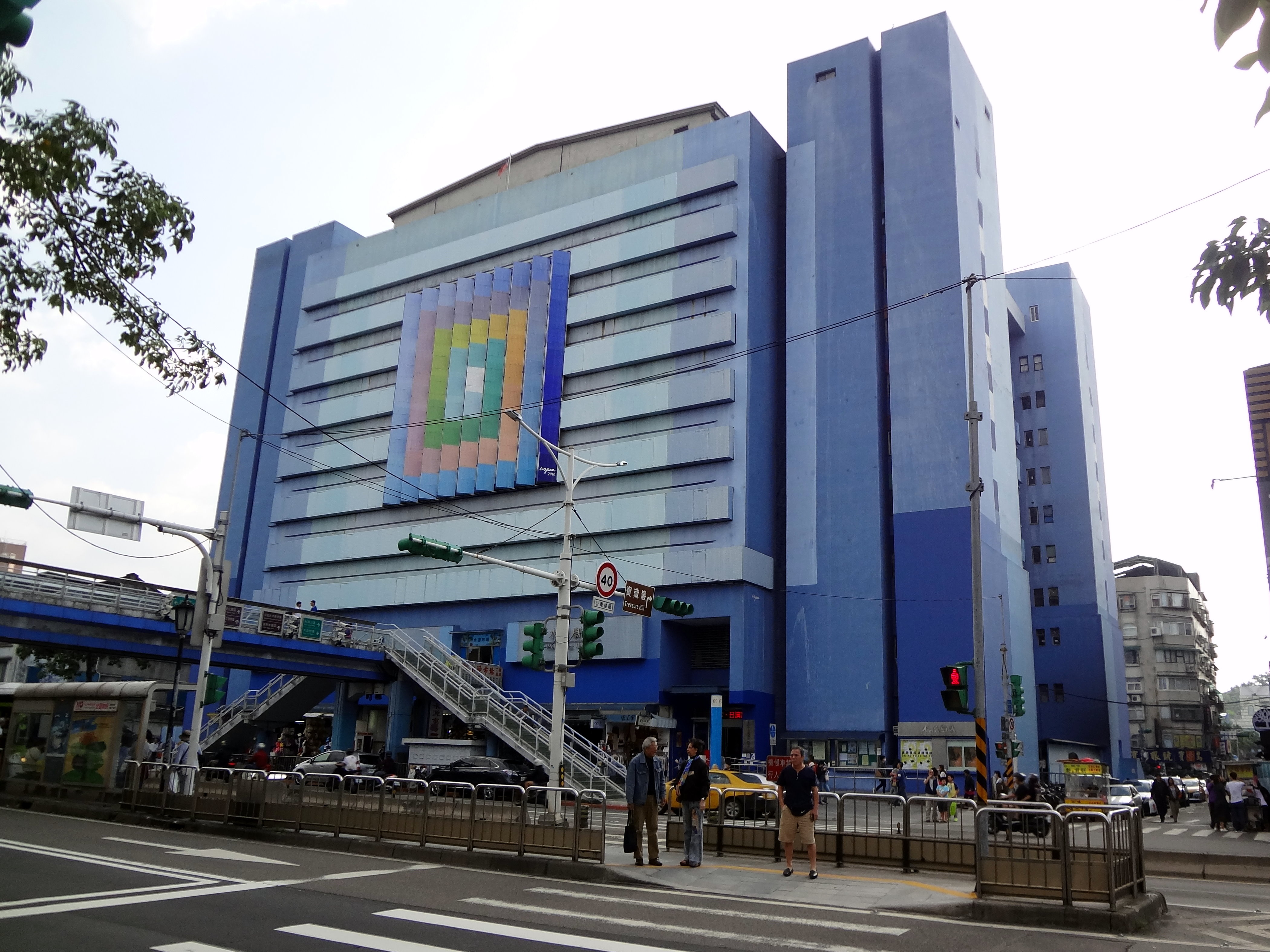 臺北市水源大樓。